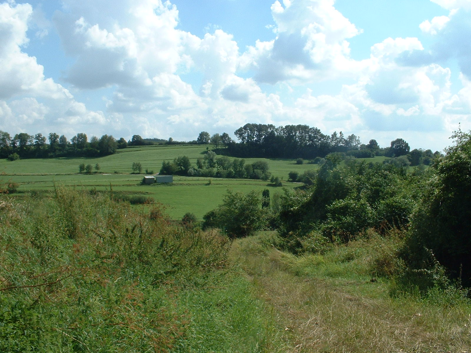 Am Scheidecker Berg